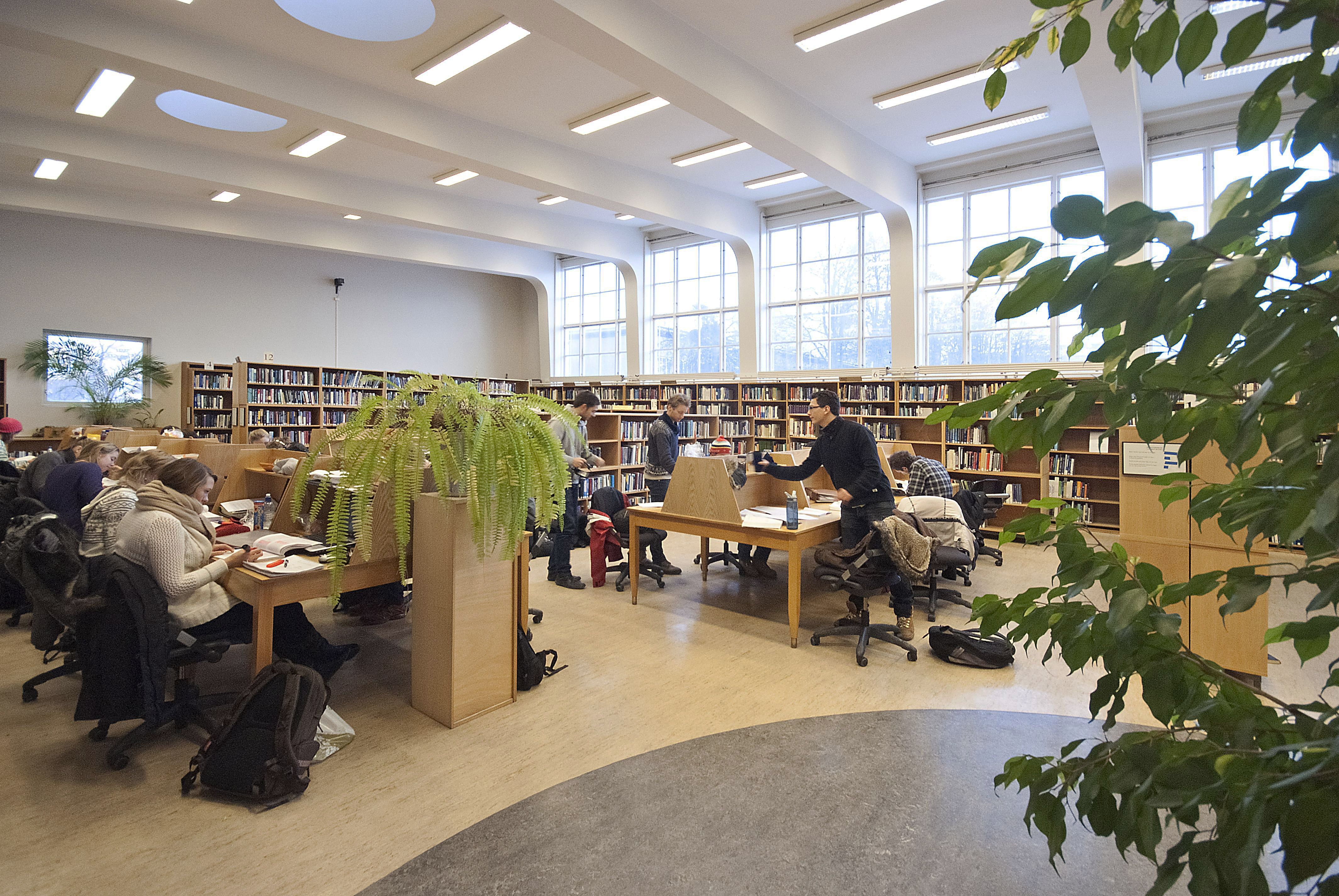 Interiøret i den nyeste delen av Teknologibiblioteket ved NTNU UB. Det lille rektangulære vinduet bak t.v. var opprinnelig rundt. Arkitekt for utvidelsen var Finn Berner (1948)